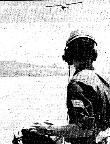 הפעלת מזל"ט בצה"ל 1986